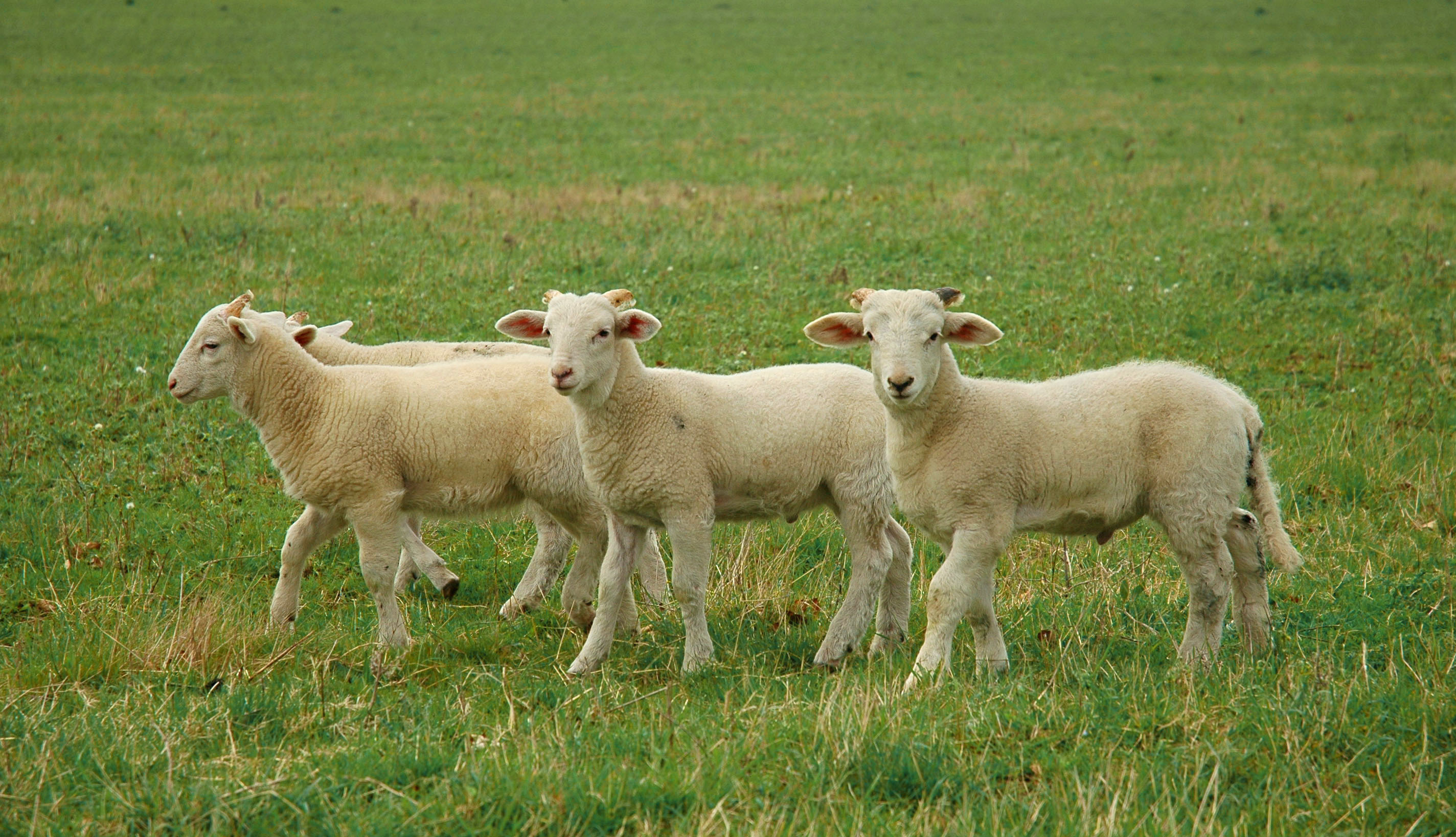 Lambs